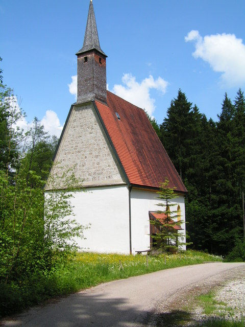 St. Kolomann, 20 km from Traunstein, Deutschland (Zone 33).